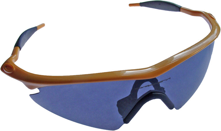 Motiv: Radsportbrille, Modell Pro M-Frame Sweep der Firma Oakley. Fotograf: KMJ Aufnahmedatum: 2004-06-19 Aufnahmeort: Studio Bildname: Radsportbrille_01_KMJ.jpg Bildgröße: 768 Pixel x 455 Pixel (34.682 Bytes)